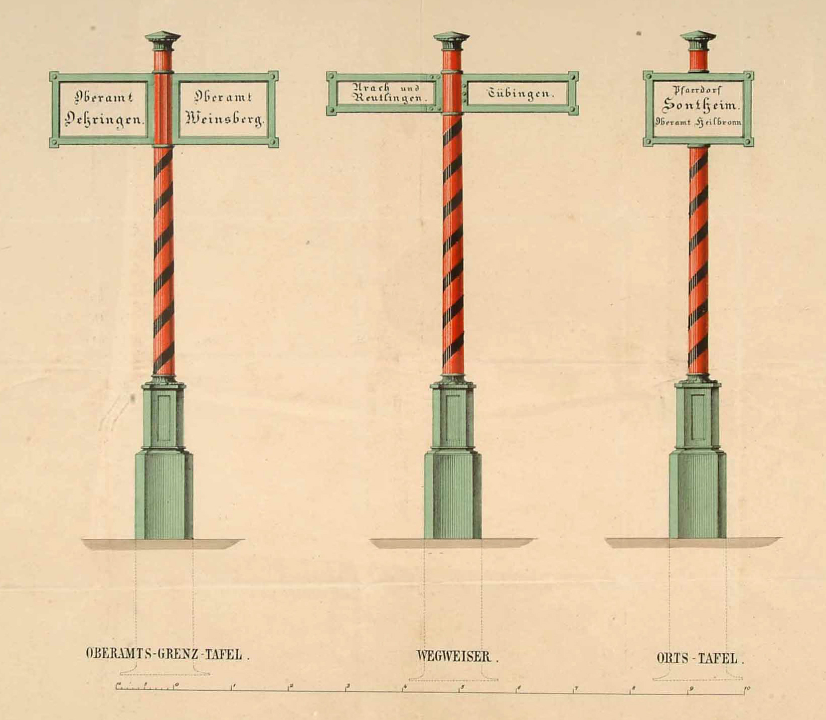 Entwürfe für württembergische Grenzpfähle, Wegweiser und Ortstafeln, 1863 (StAL F 126 I Bü 84)